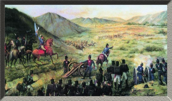 Battle of Salta (Argentine insurgents against the Spanish). Batalla de Salta, 20 de febrero de 1813. Triunfo patriota contra los realistas. Óleo sobre tela. Dimensiones: 77 cm por 127 cm. Donación de: Comisión de Homenaje al Gral. Belgrano. Complejo Museográfico Provincial 'Enrique Udaondo'. Luján. Provincia de Buenos Aires. Argentina.